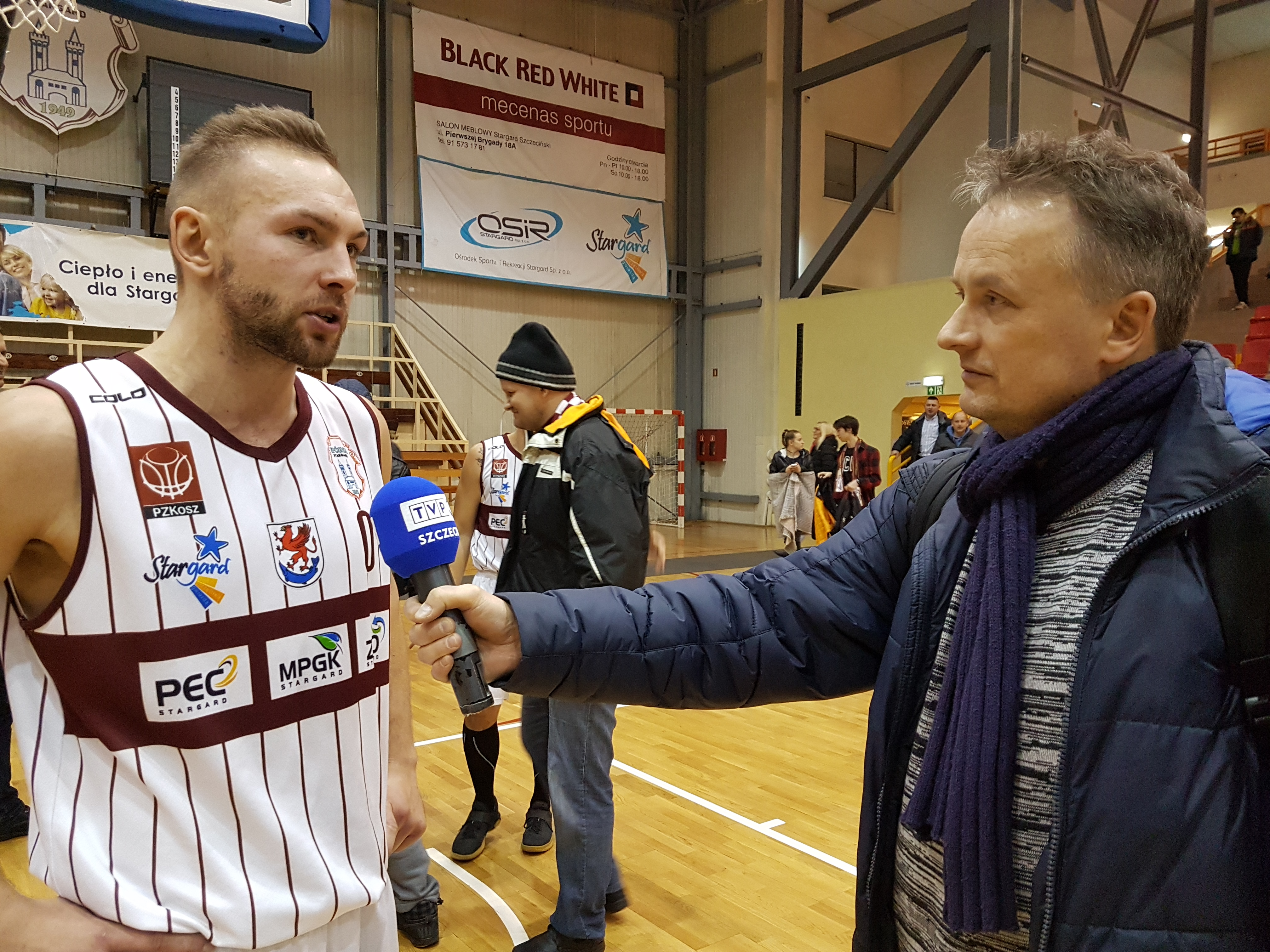 Stargard, 06.12.2017. Wywiad Dawida Bręka dla TVP3 po meczu z Biofarmem Poznań